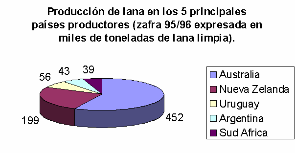 Producción de lana.